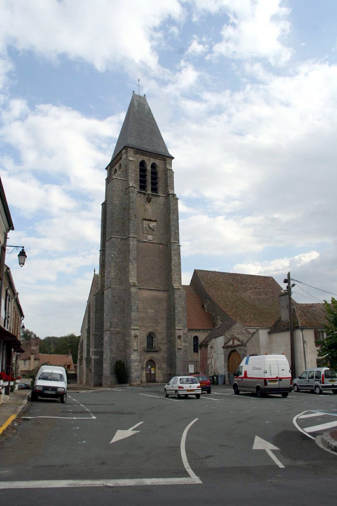 Église de Sonchamp - Yvelines (France)